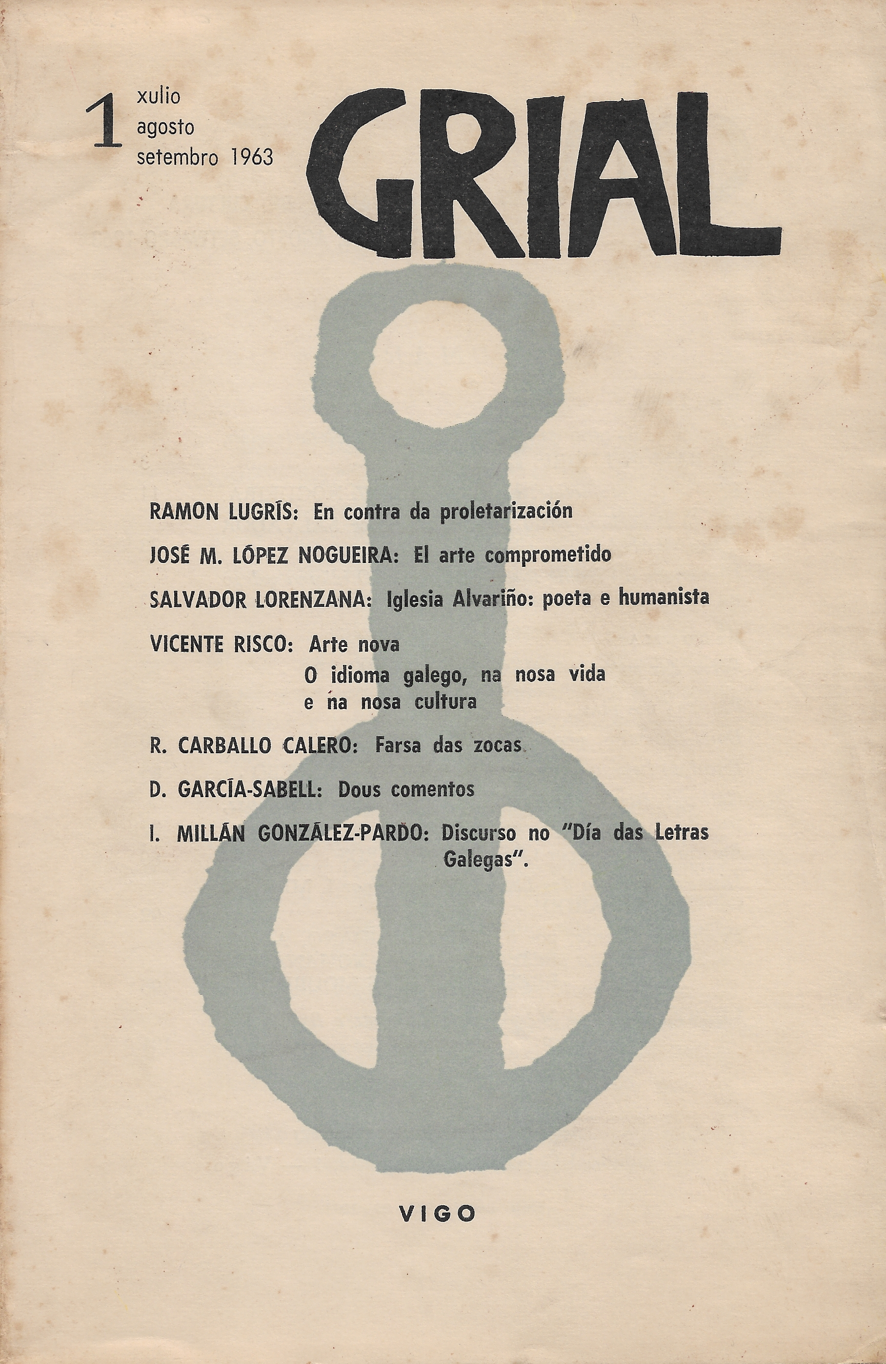 Portada do número 1 da revista Grial